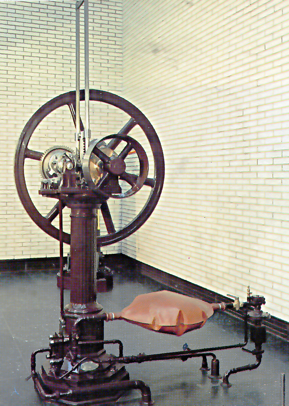 Atmospharische_Gaskraftsmaschine_von_Otto_Nr.1